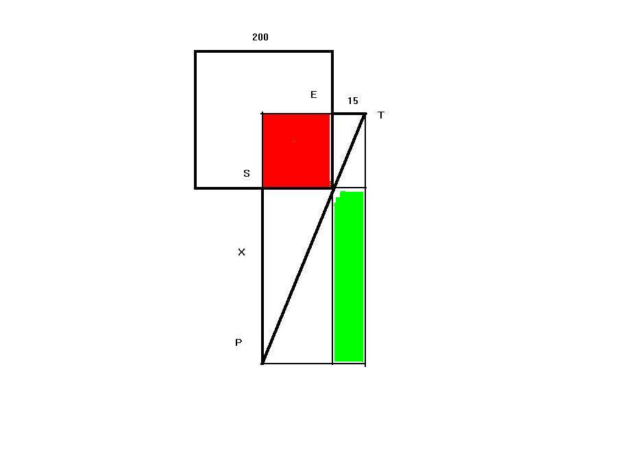 Problem 17, chapter 9,Jiuzhang suanshu.《九章算术》第九卷勾股第十七题： 今有邑方二百里各中开门。出东门十五步有木，问出南门几何步而见木？今有邑方二百里各中开门